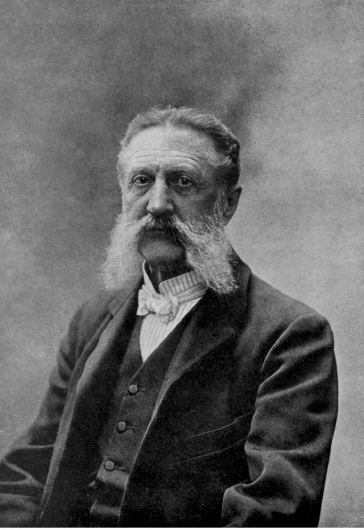 Ritratto di Guglielmo Koerner (1839-1925) all'età di 70 anni